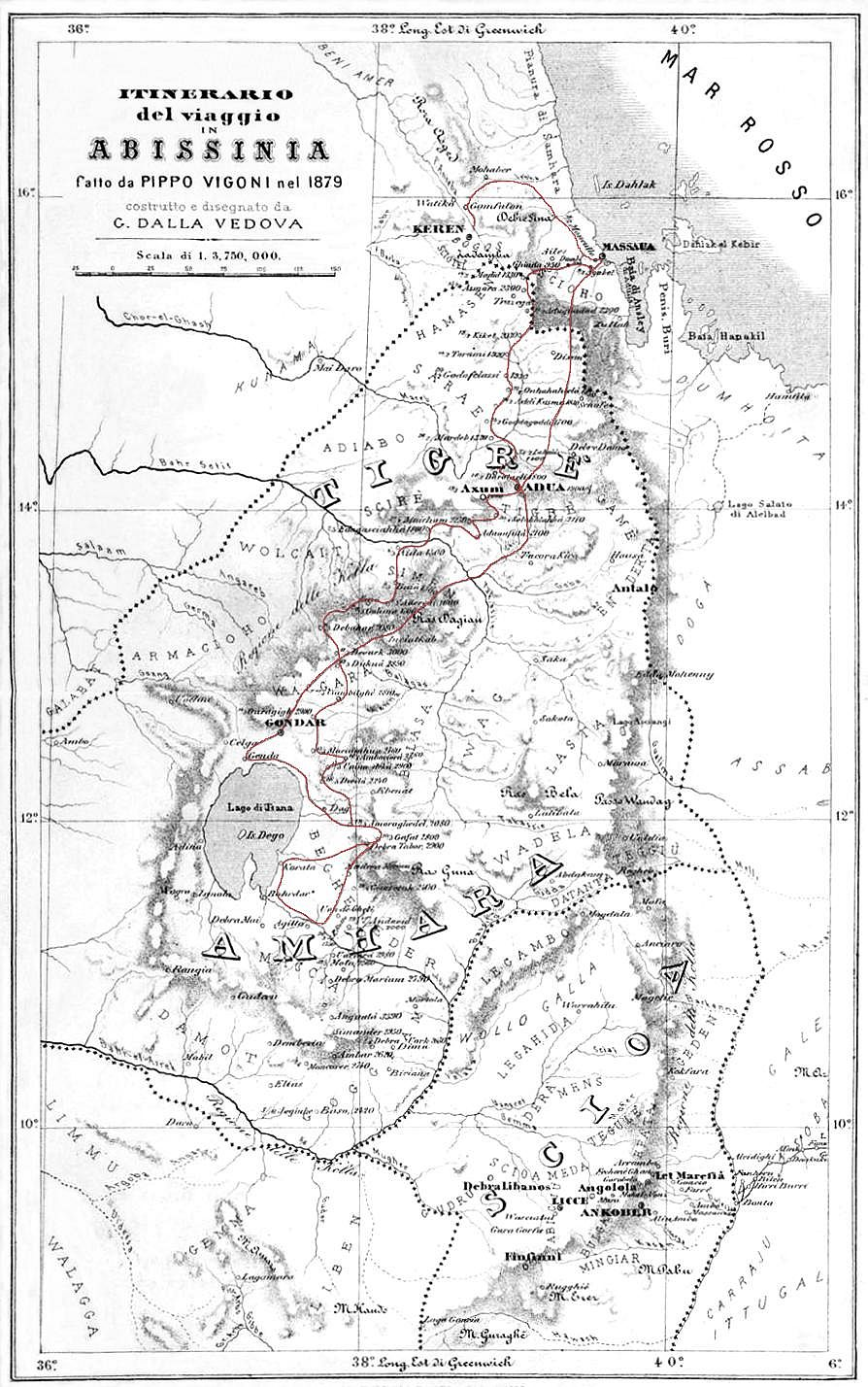 Itinerario del viaggio in Abissinia fatto da Pippo Vigoni nel 1879 tratto da Pippo Vigoni, Abissinia, Giornale di un viaggio, Milano, 1881